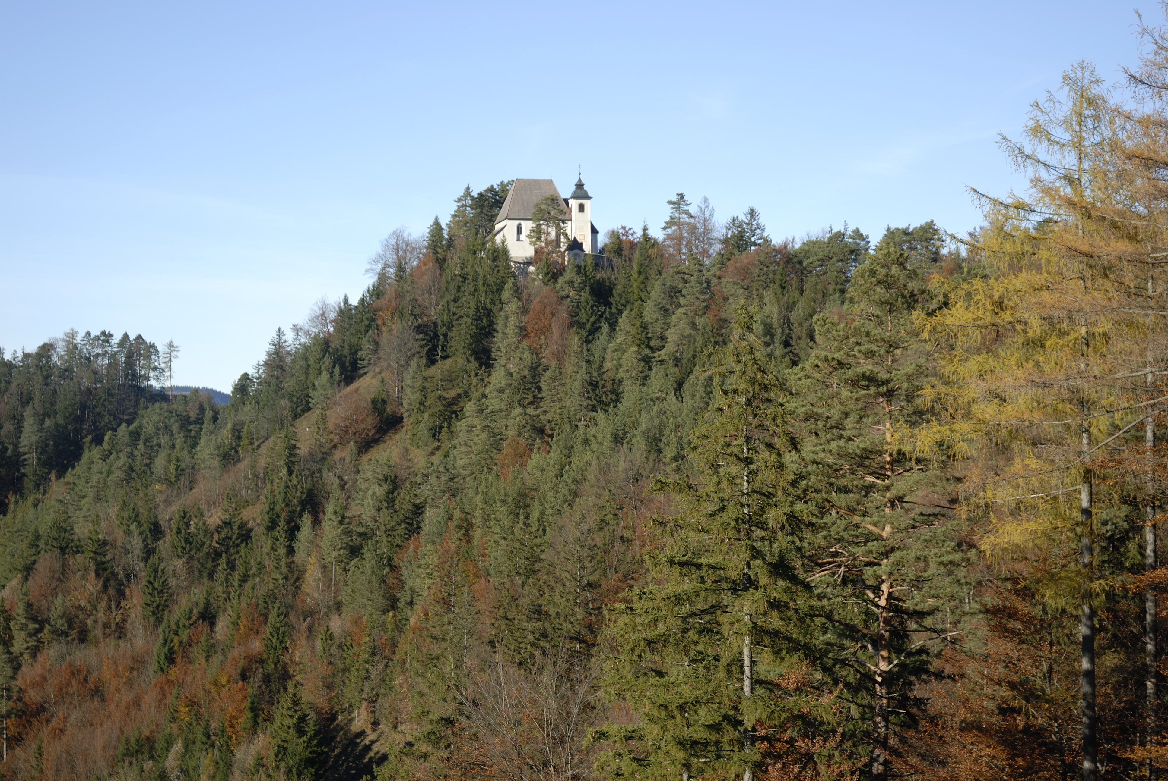 Sebalduskirche bei Gaflenz von Süden